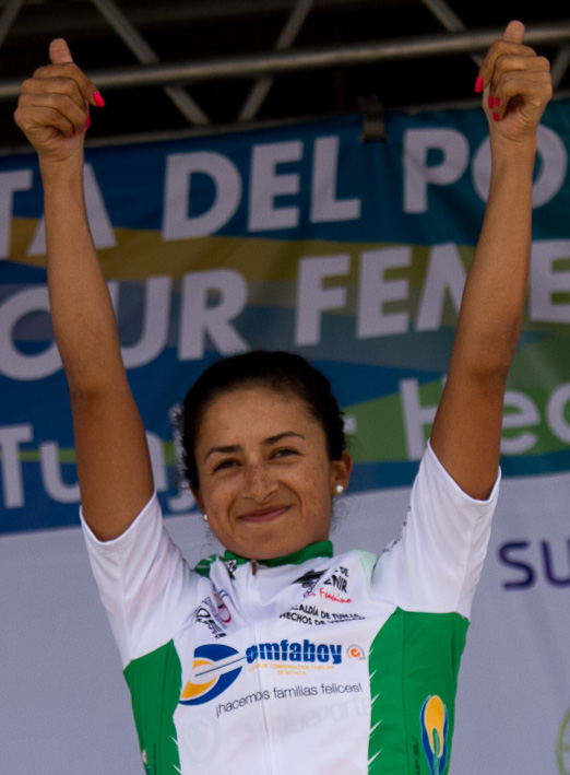 Laura Lozano en el podio. Et.4 Tour Femenino 2015 Sábado 28 de noviembre de 2015. Cómbita - Tunja - Sogamoso - El Crucero (100Kms)